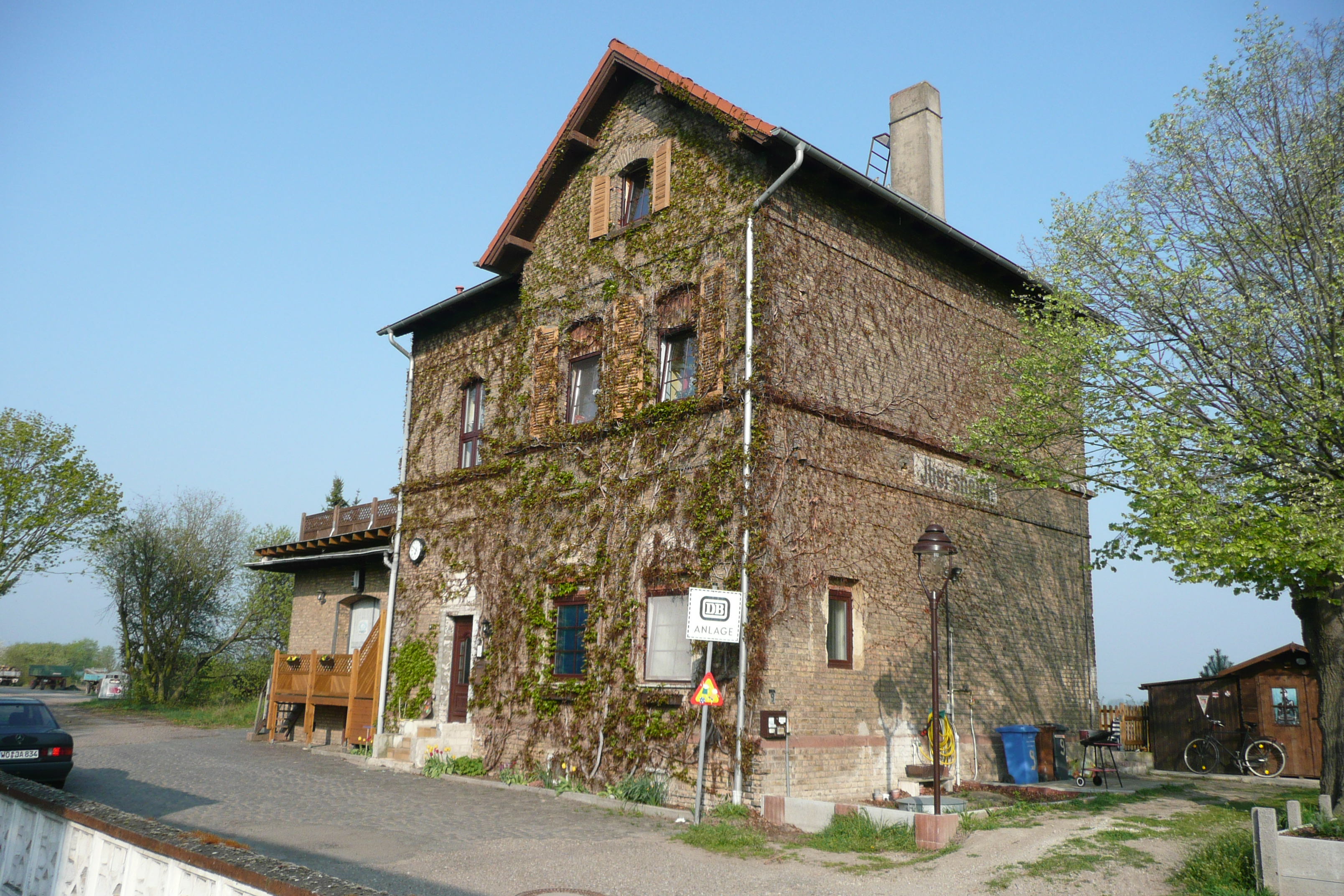 Bahnhof in Ibersheim (in Betrieb von 1900 bis 1969)